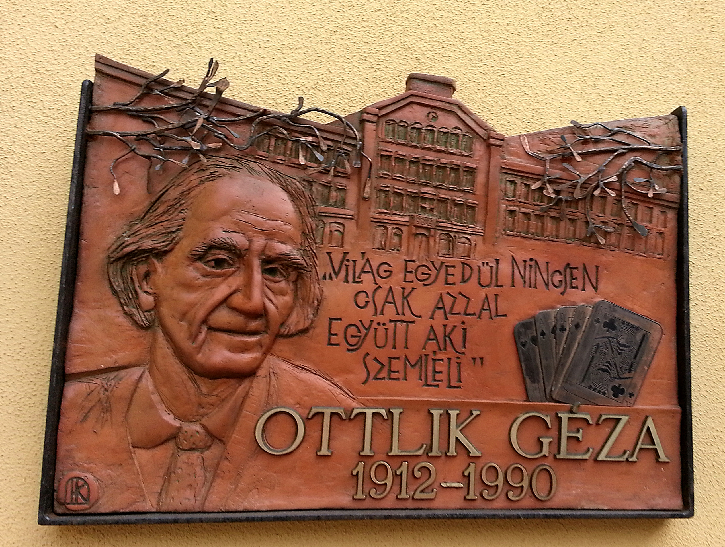 Ottlik Géza emléktáblája a Szent Lukács Gyógyfürdőben (Krajcsovics Károly alkotása)